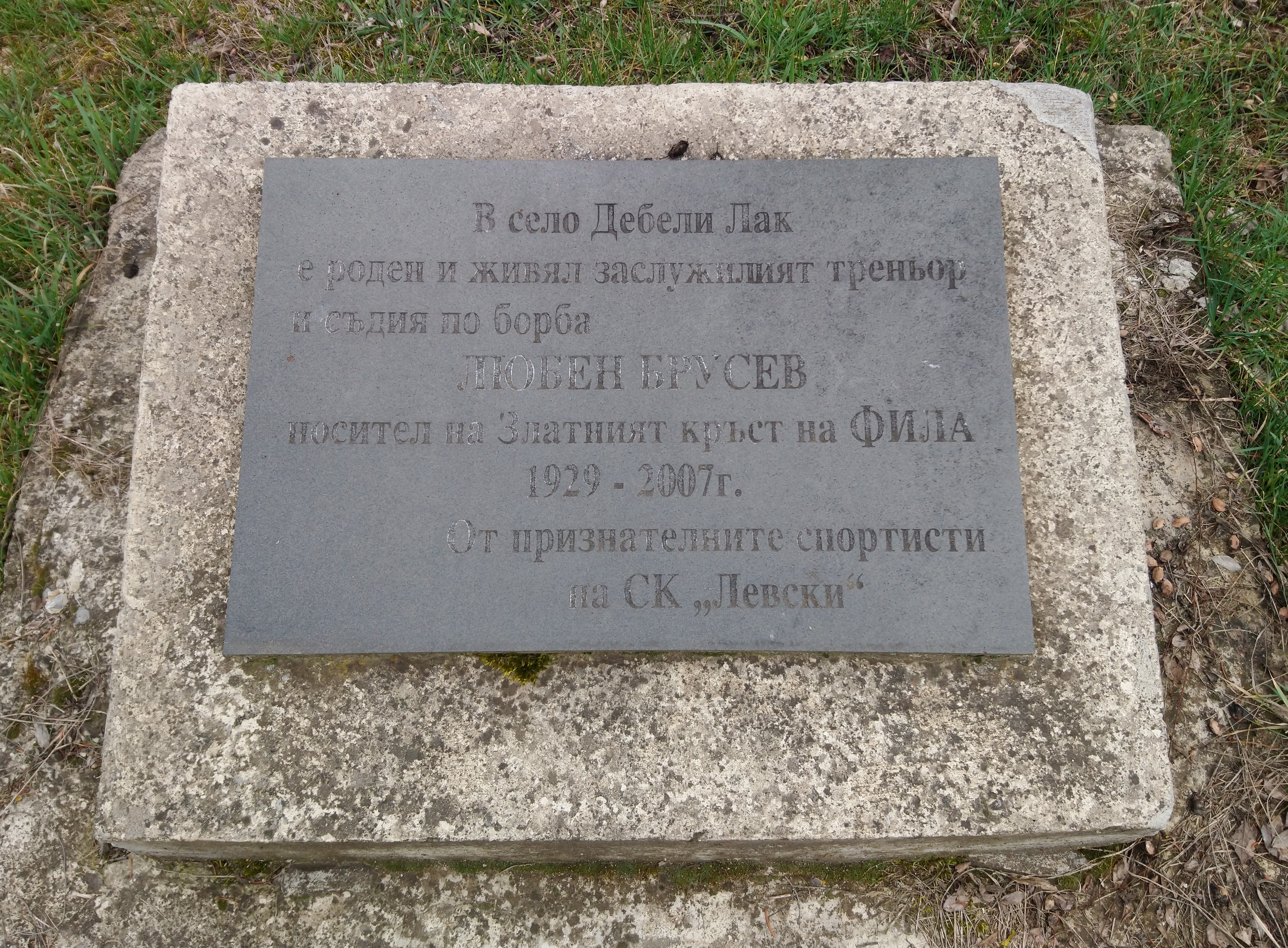 Паметна плоча на треньора и съдия по борба Любен Брусев в родното му село Дебели лаг